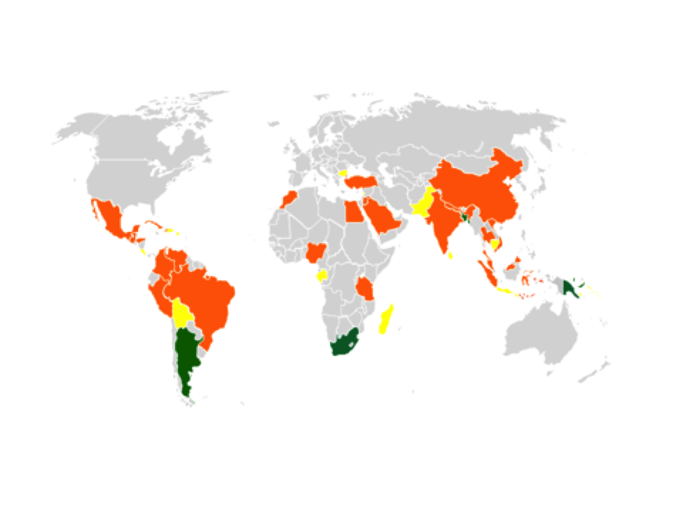 Estan representades les àrees: d'infecció endèmiques (taronja), de casos d'infecció sense antecedents de viatge (verd) i que han sigut visitades per viatgers que han adquirit la infecció (groc)